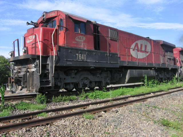 C30-7 Em Balsa Nova